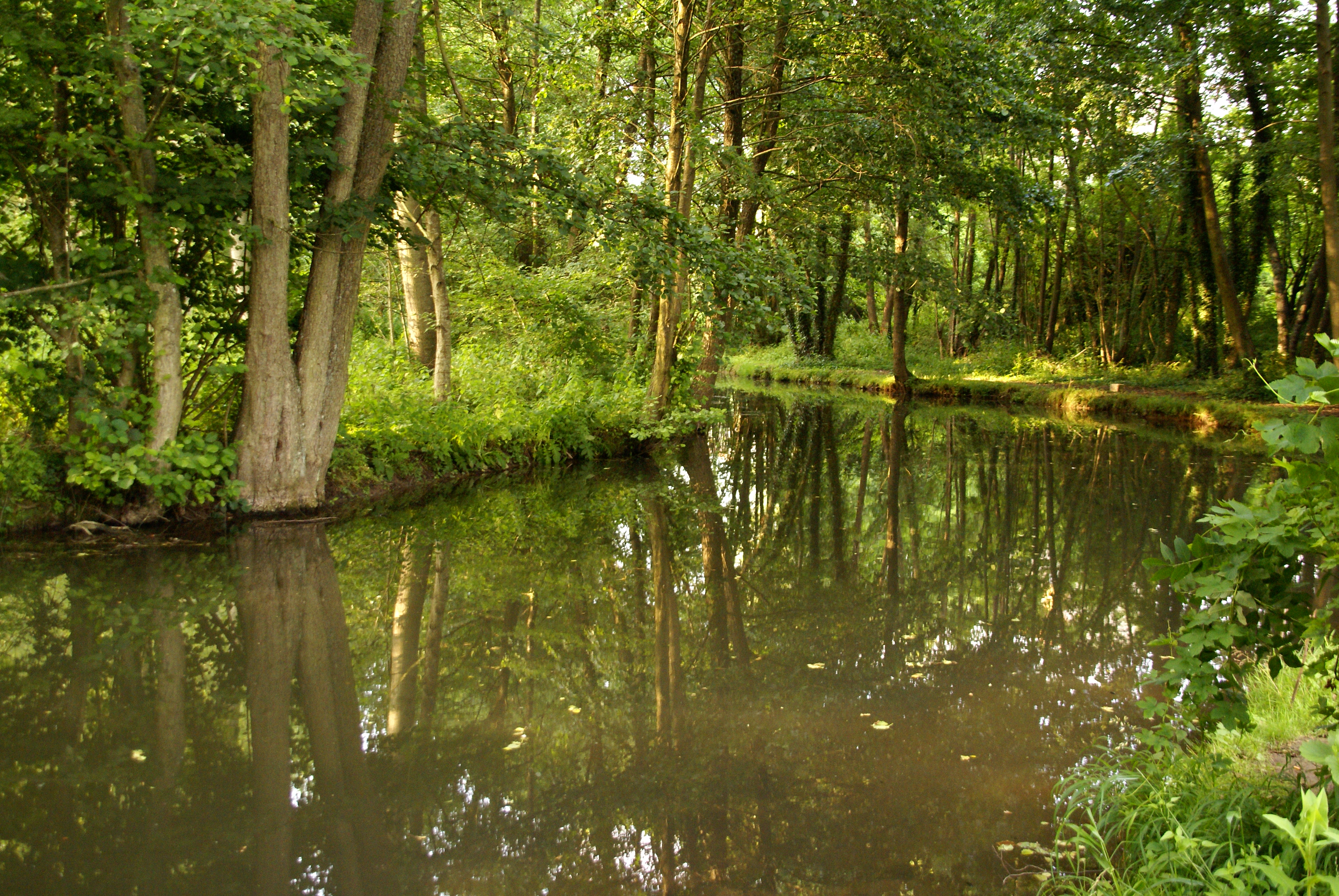 BALLADE LE LONG DU PETIT MORIN A MONTMIRAIL